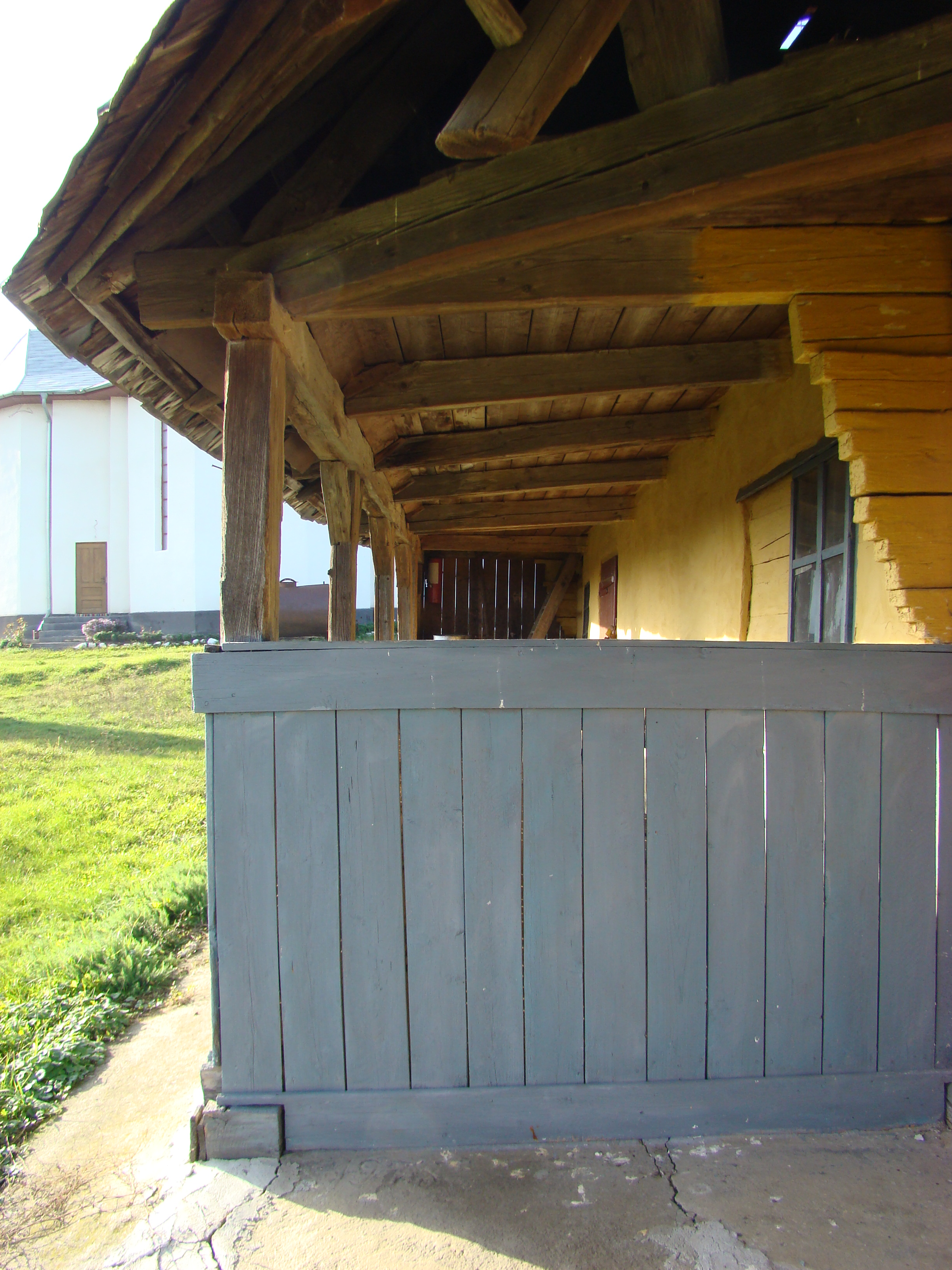 Biserica de lemn "Sf. Arhangheli Mihail şi Gavriil" , sat BERCHIEŞU; comuna FRATA